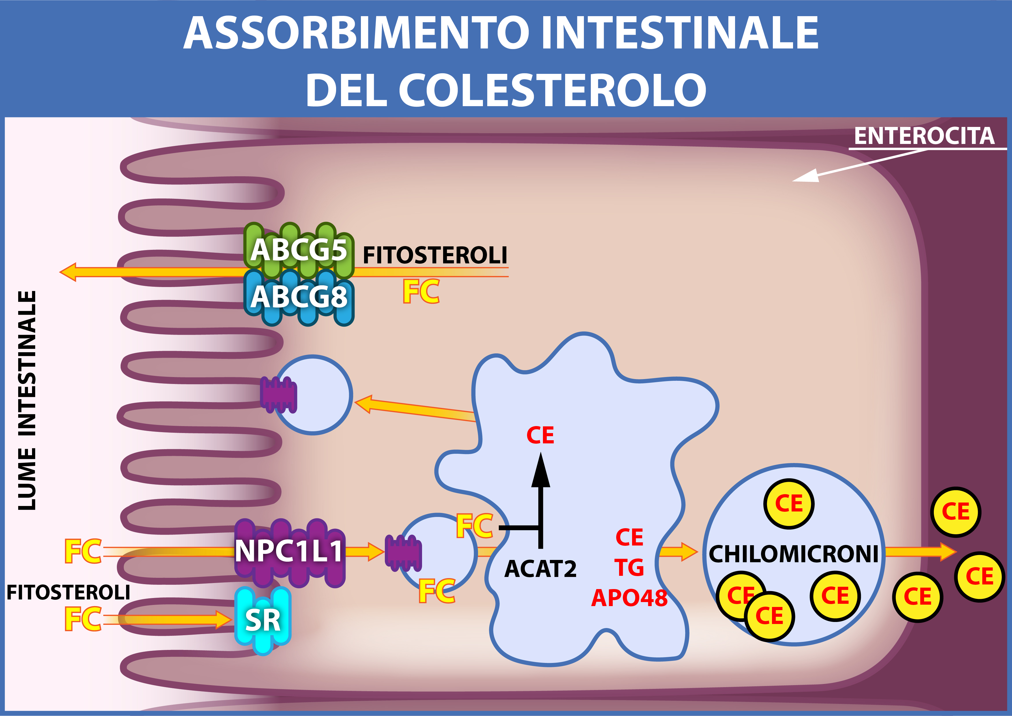 Schema del metabolismo del colesterolo negli enterociti